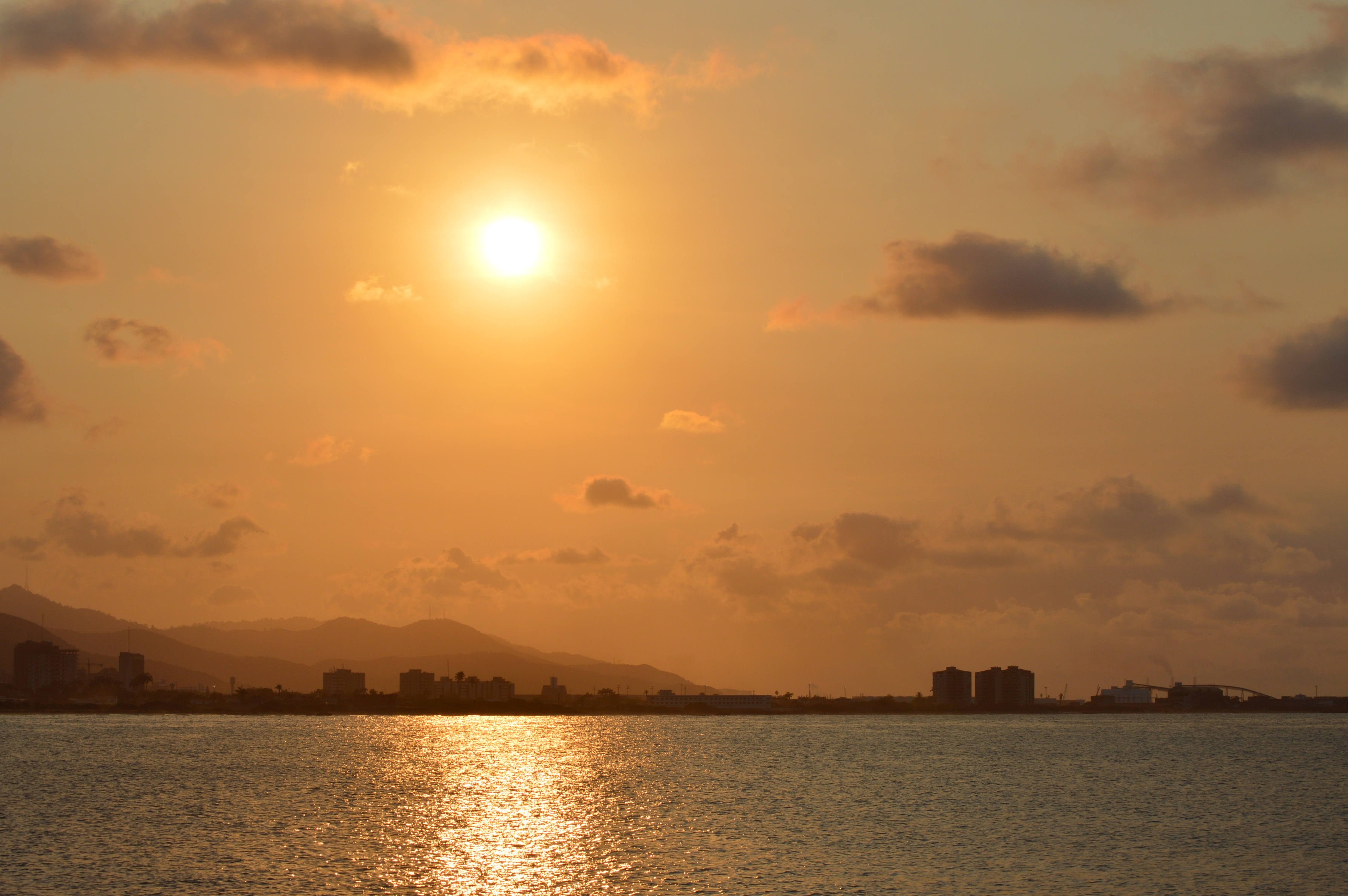 Puerto Cabello Estado Carabobo